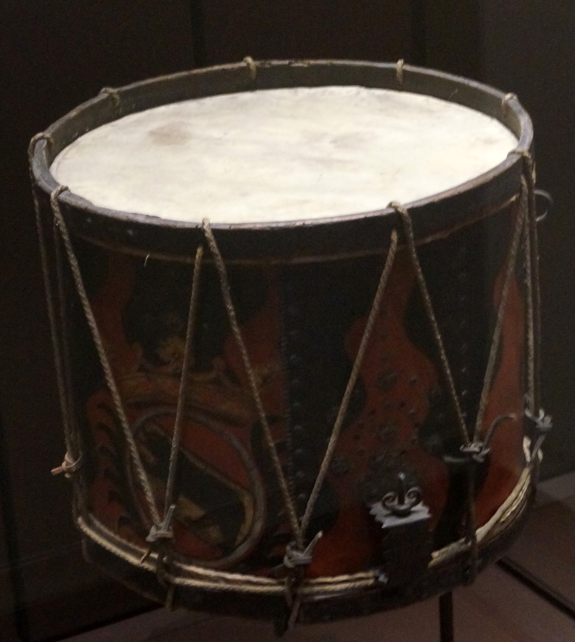 Musée de l'Armée - collection.